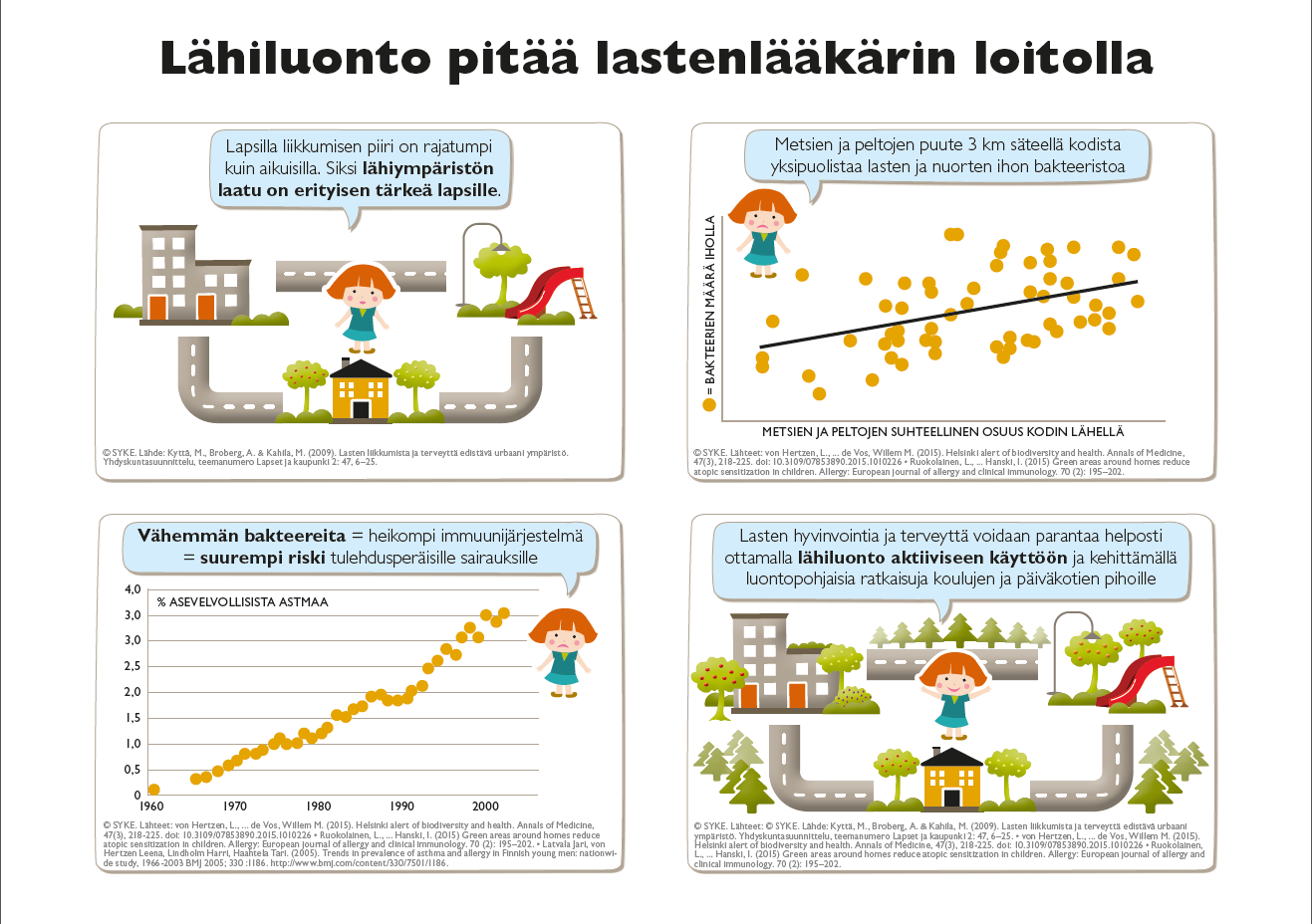 Luontopohjaisia ratkaisuja yhteiskunnallisiin haasteisiin -hankkeessa SYKEssä syksyllä 2016 tuotettua infografiikkaa lähiluonnosta luontopohjaisena ratkaisuna kaupungeissa.